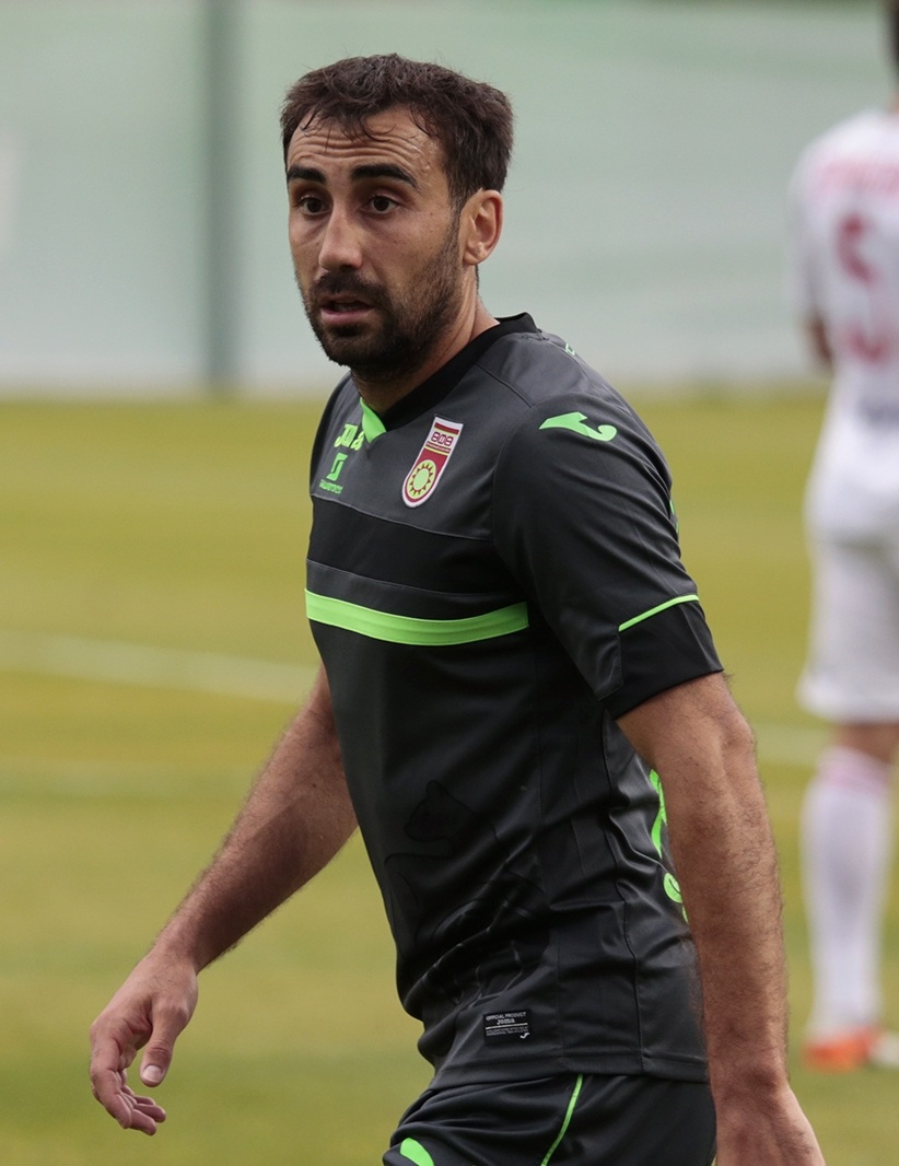 Николай Сафрониди, 07.07.2016